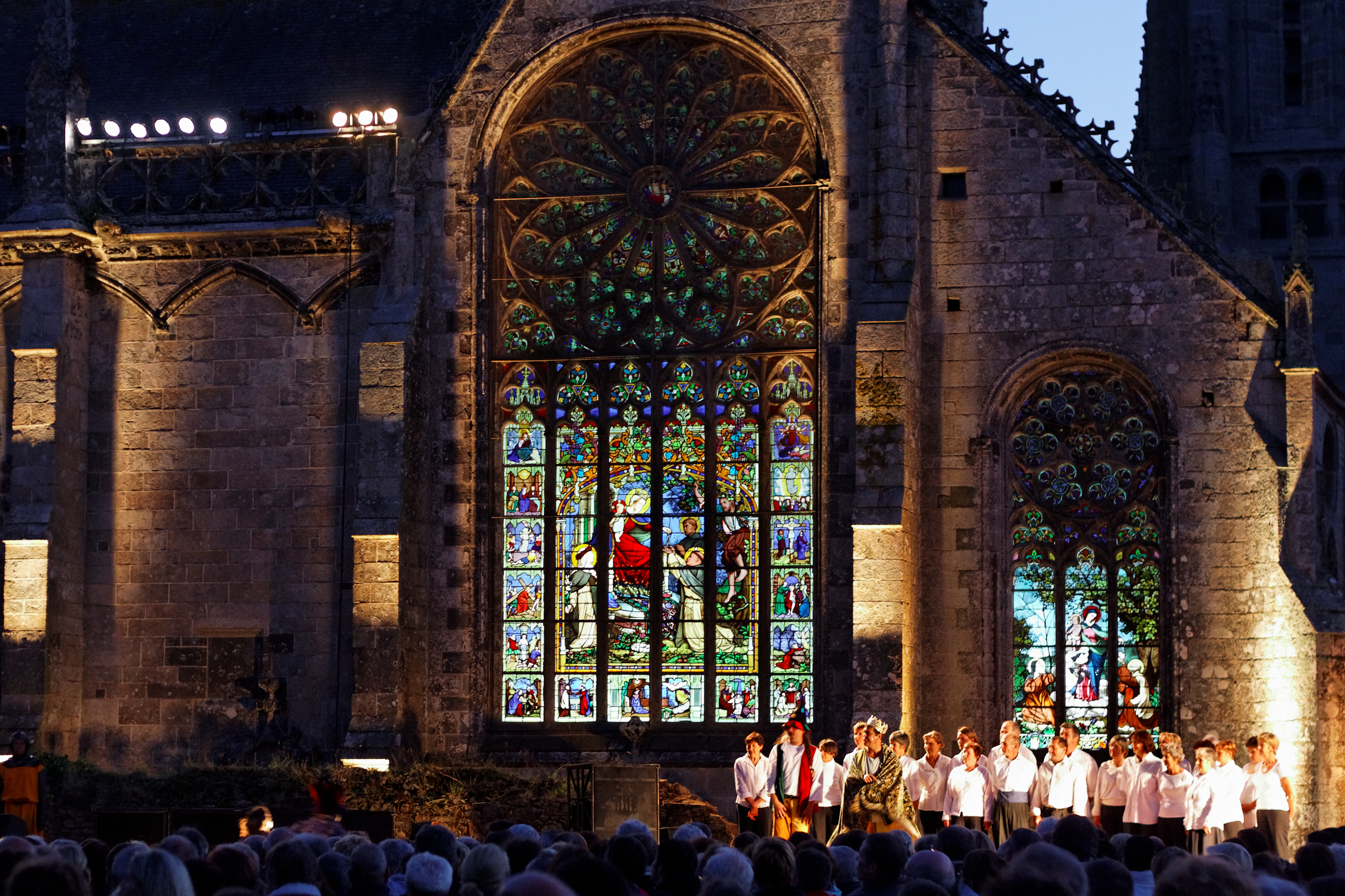 Spectacle son et lumière Ar vro Bagan, au Folgoët, 2010